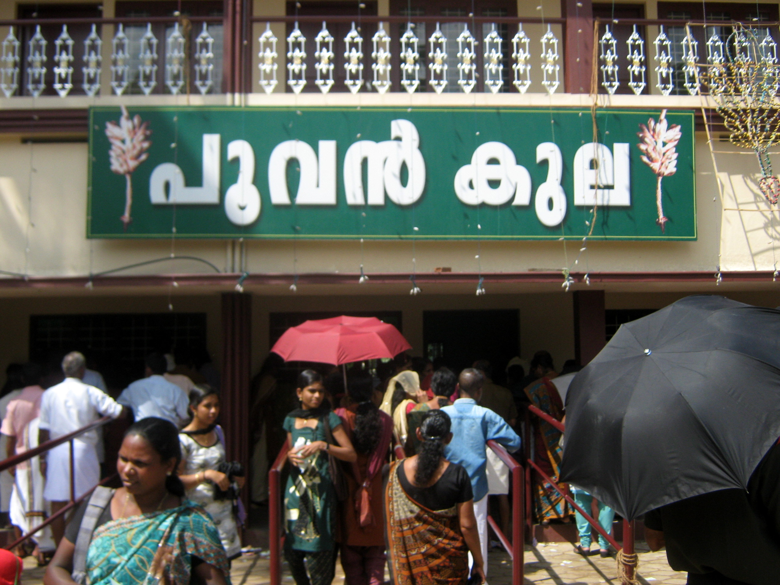 കൊരട്ടിമുത്തി തിരുനാള്‍ 2012